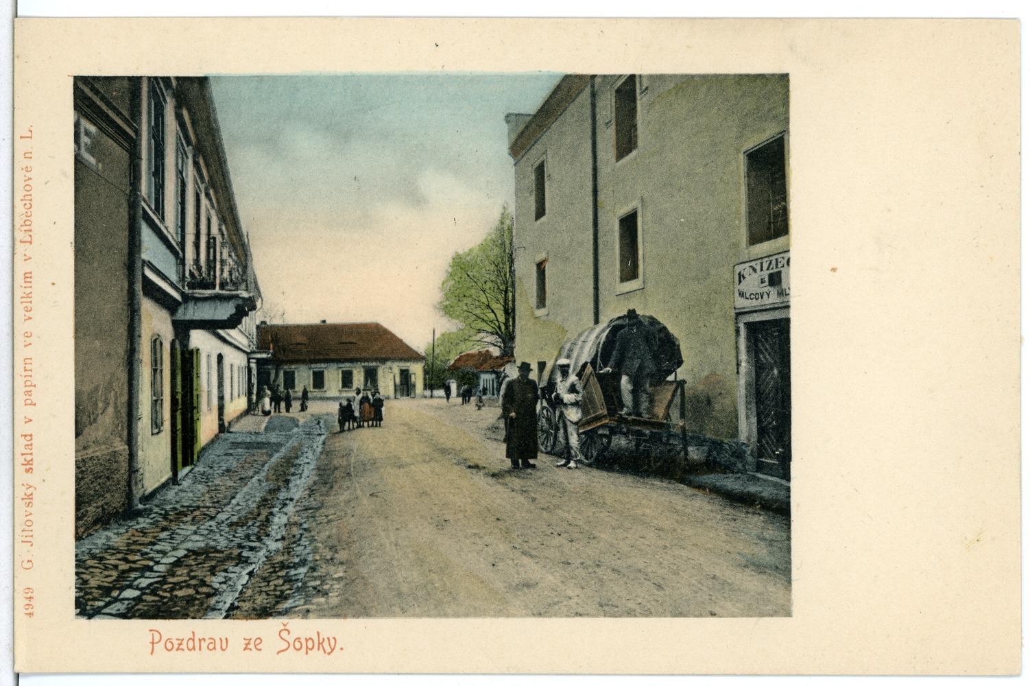 Pozdrav ze Šopky; Straße; jetzt Pšovka u Mělníka This postcard is from publisher Brück & Sohn in Meißen ( This postcard has a unique number 04949 and is available in a higher resolution at the publisher. This images was uploaded in a cooperation project between Wikipedians and the publisher.